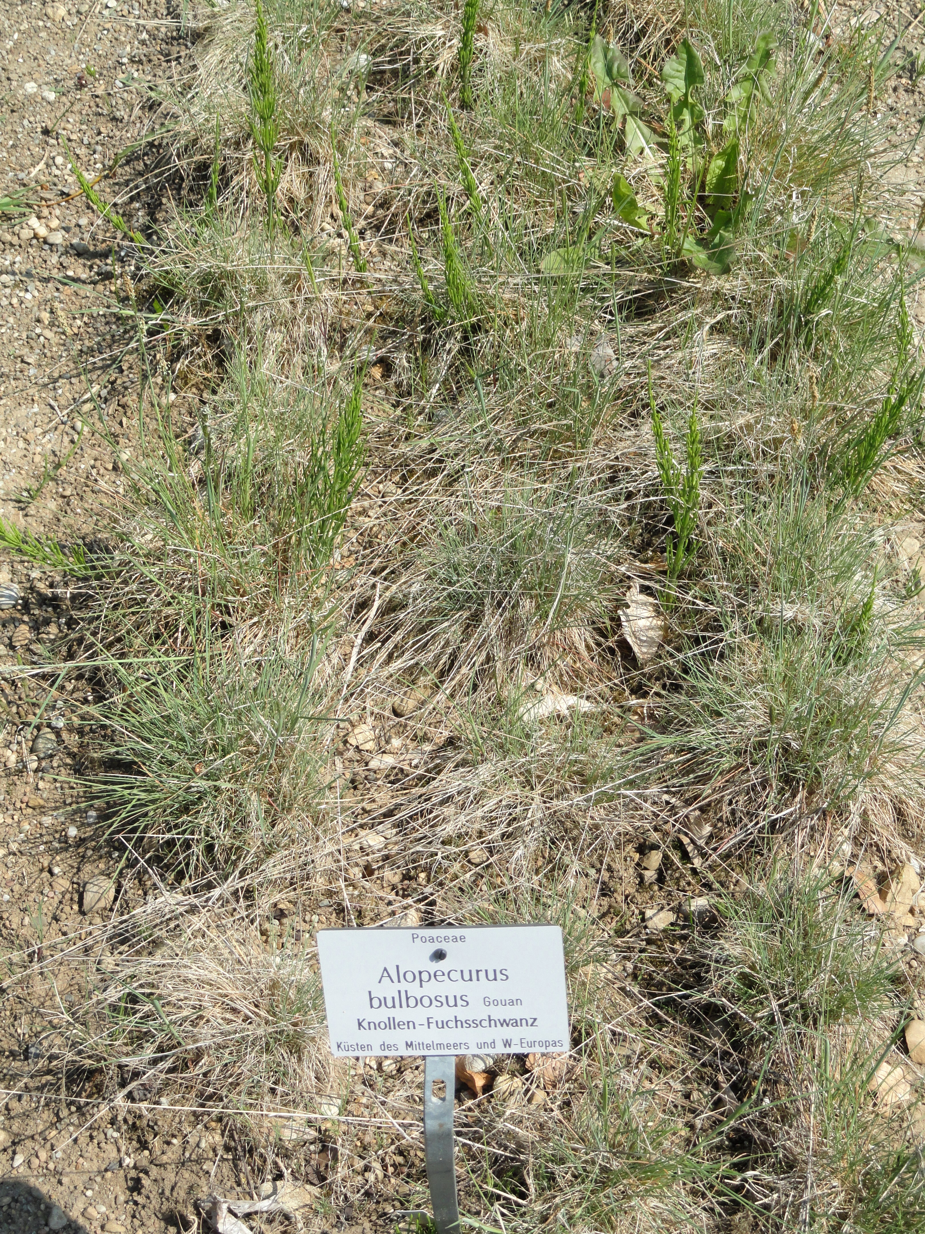 Alopecurus bulbosus specimen in the Botanischer Garten München-Nymphenburg, Munich, Germany.